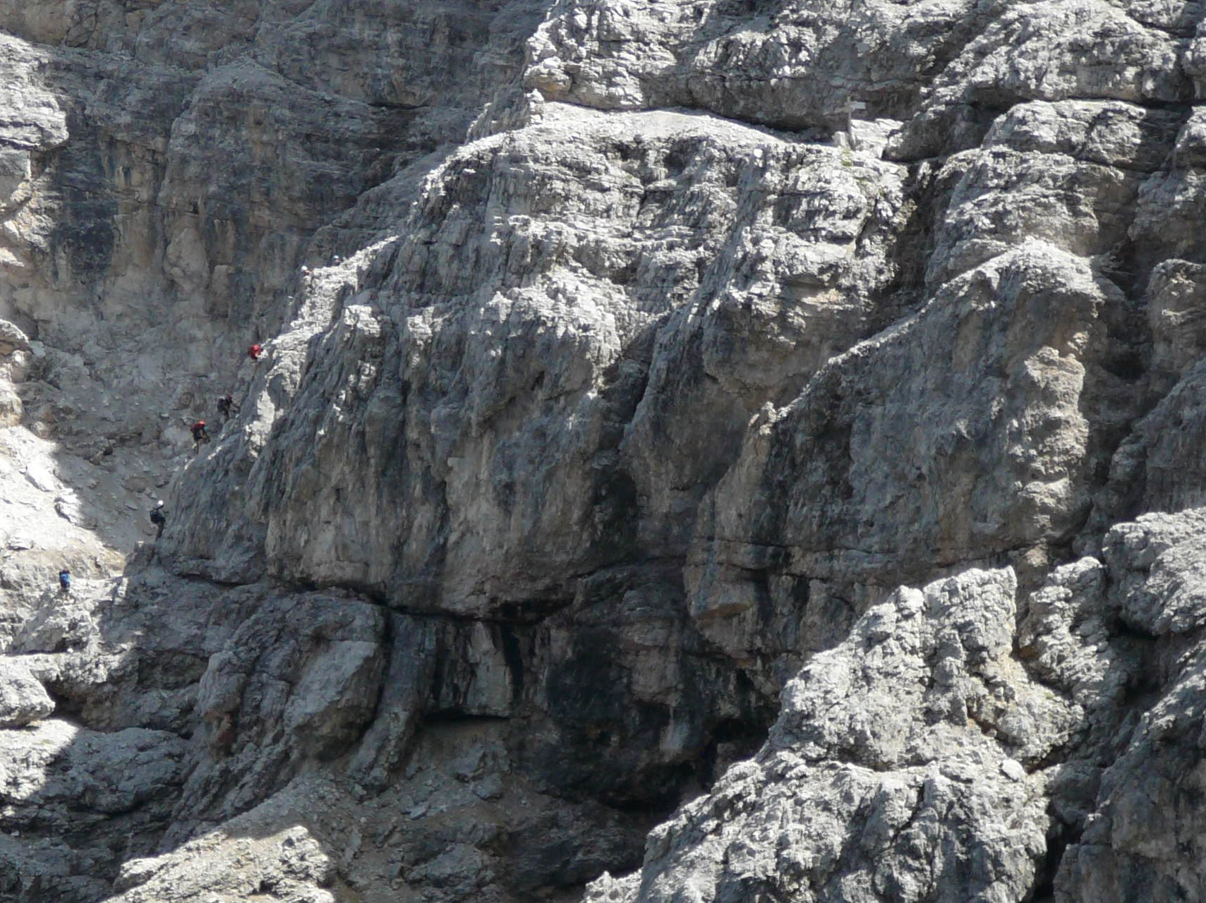 Strada degli Alpini - via ferrata